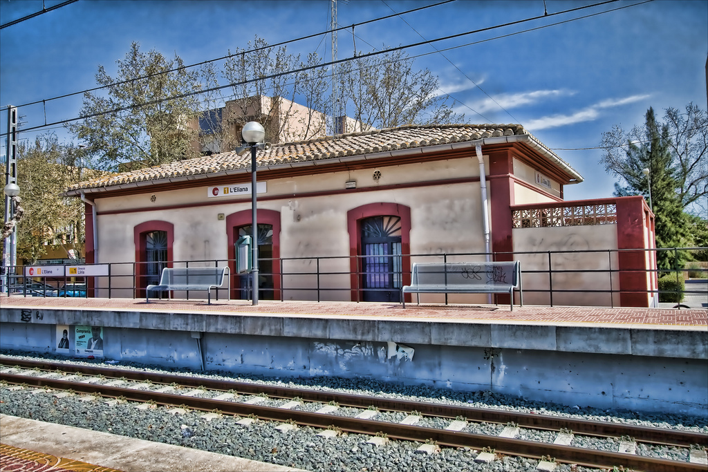 Estació de la Línia 1 de MetroValència al seu par per l'Eliana (Camp del Túria, País Valencià)